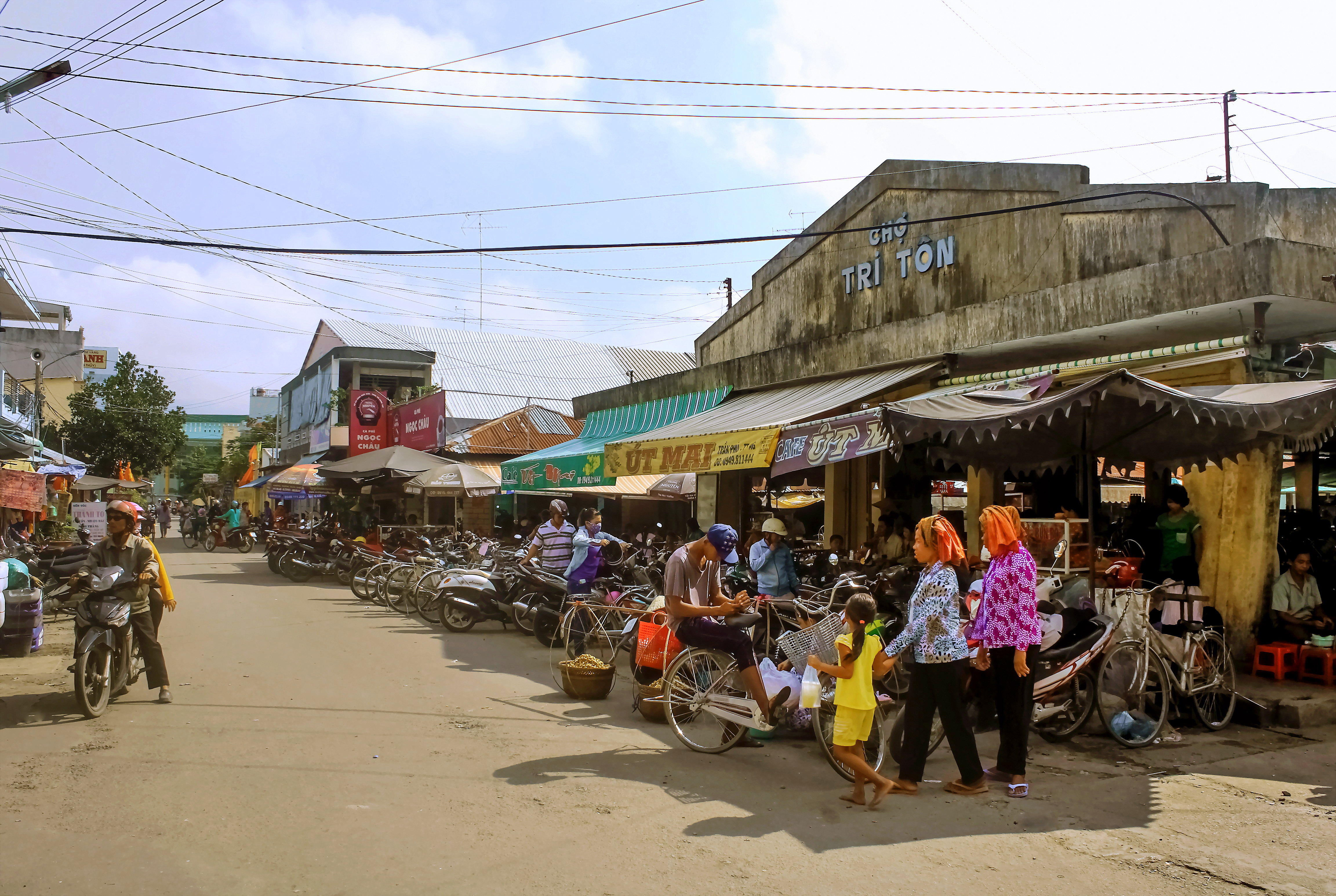 Chợ thị trấn Tri Tôn, thuộc huyện Tri Tôn, An Giang, Việt Nam.